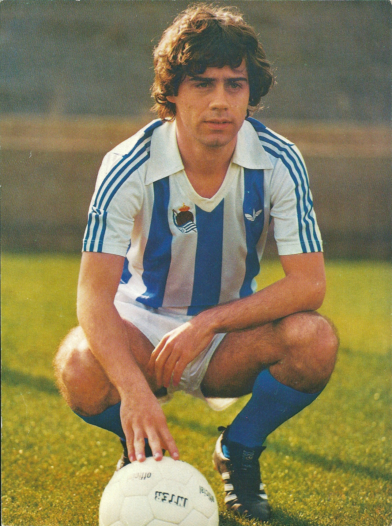 Posando con la camiseta de la Real Sociedad